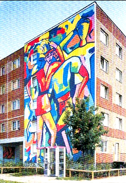 Marici-Bild für Antigua und Barbuda; Hausfassade in Berlin-Hellersdorf